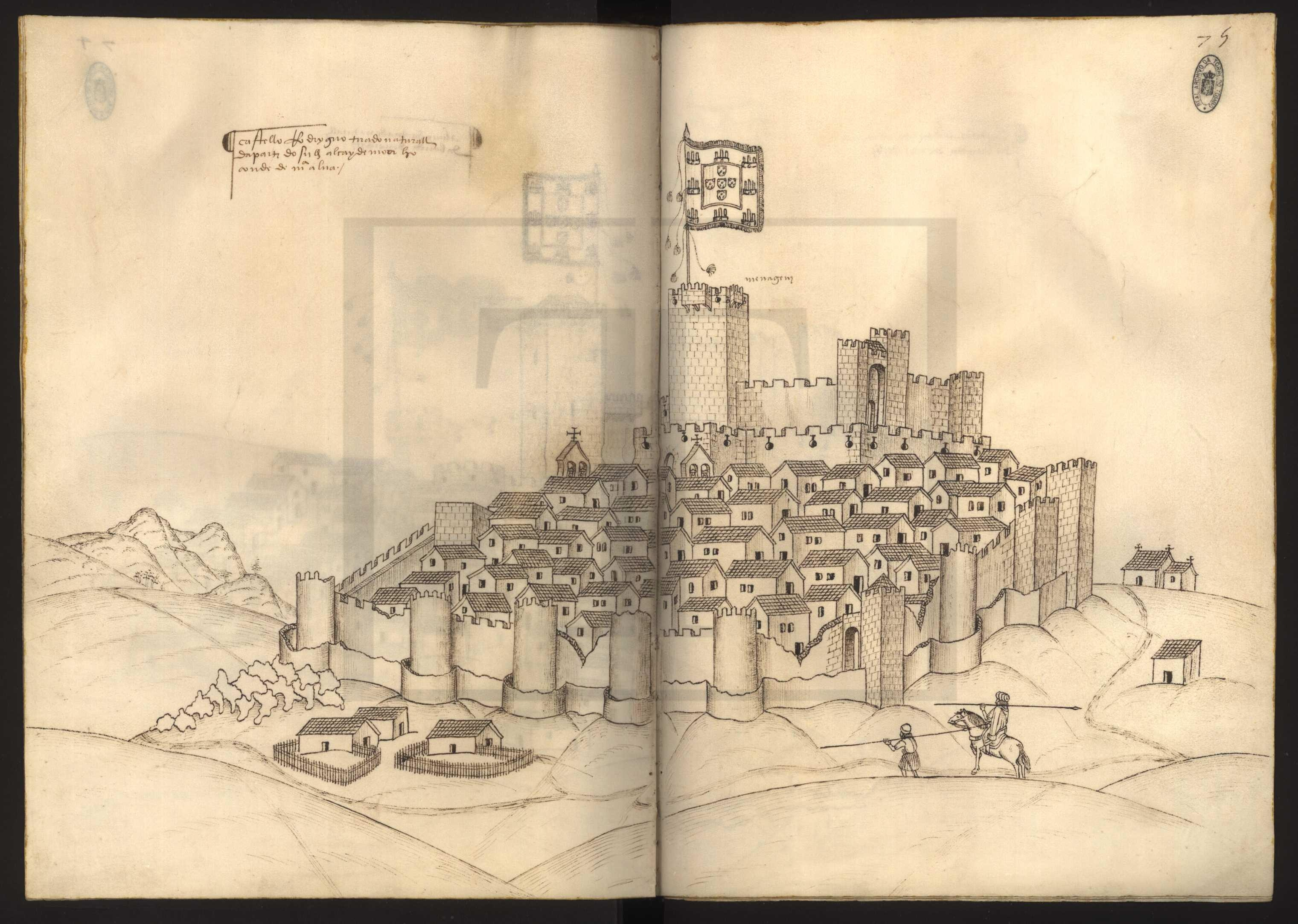 Livro das Fortalezas 75 - Castelo Rodrigo